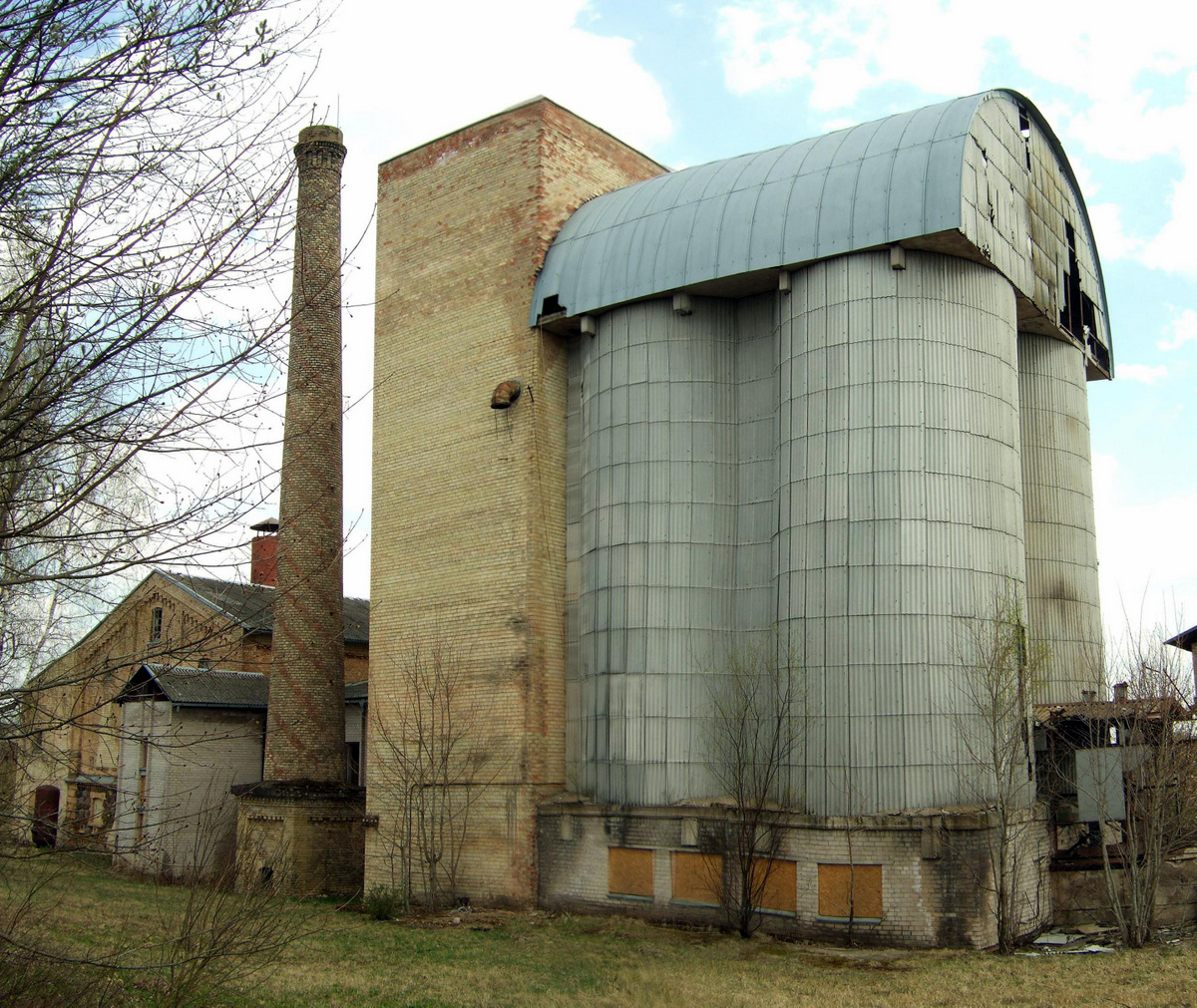 Raudondvario (Nemenčinė) dvaro sodybos bravoras